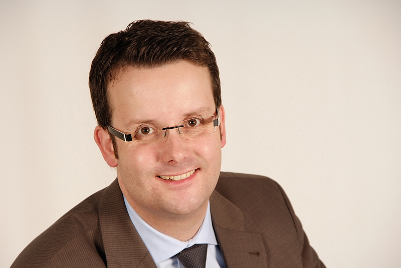 Christian Grascha, Landtagsabgeordneter Niedersachsen, 16. Wahlperiode (Fotoprojekt Landtagsabgeordnete Niedersachsen am 24. und 25. November 2009)